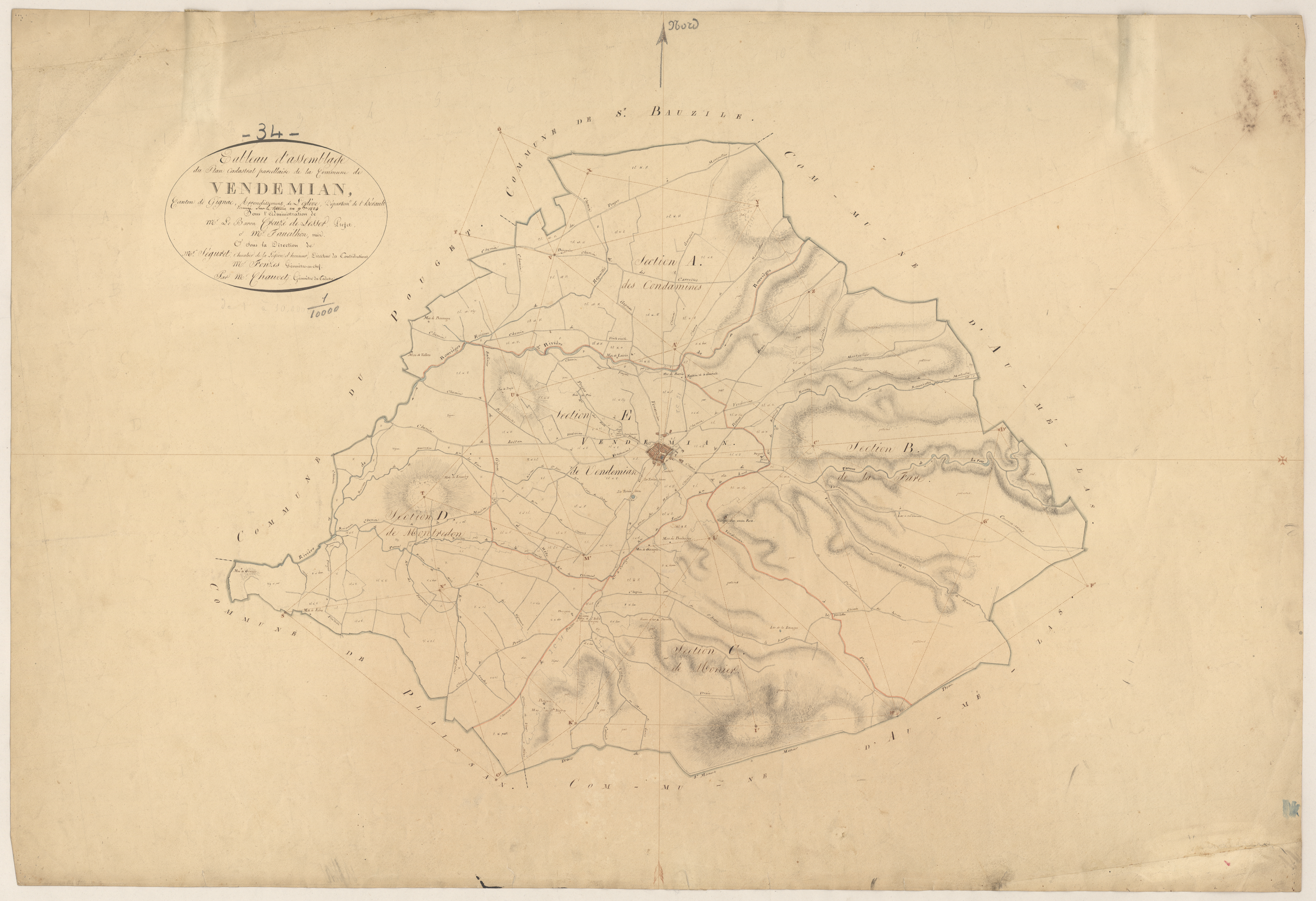 Vendémian. - Cadastre napoléonien : tableau d'assemblage.